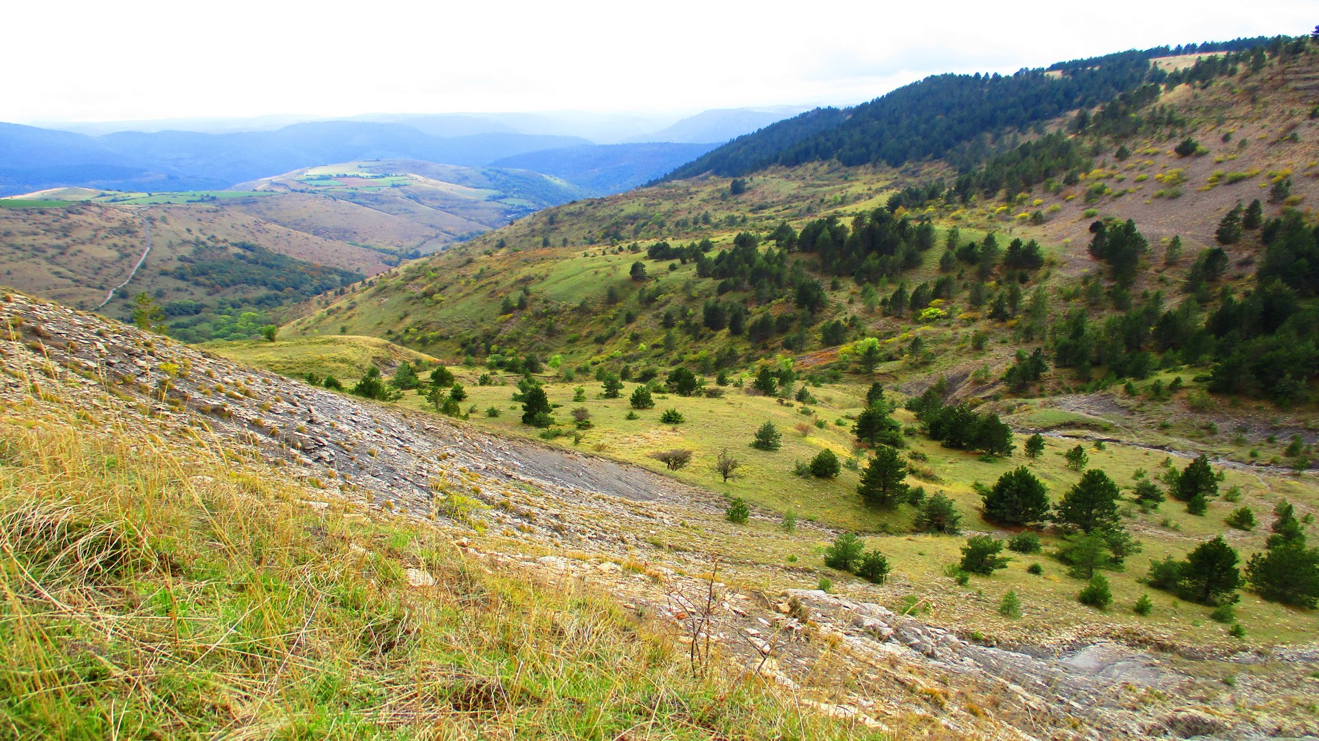 Causse de Sauveterre. P.N.C. Parc National des Cévennes, France. La Cham des Bondons. Photo prise depuis une des 2 mamelles et vers le Sud Est.